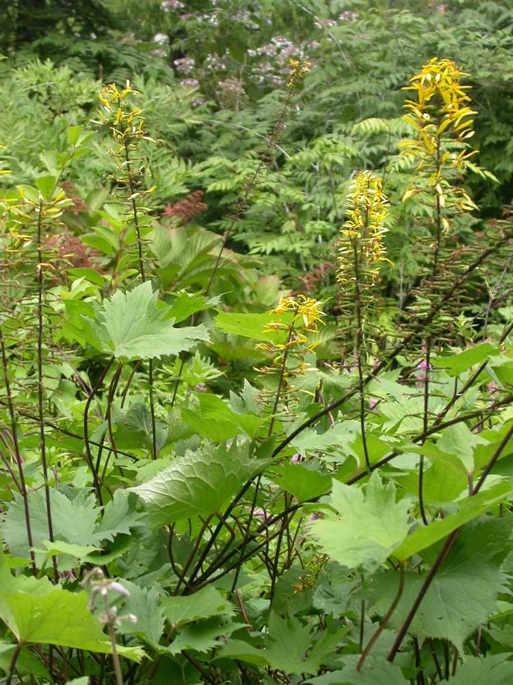 Ligularia stenocephala